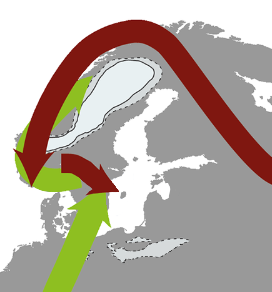 Stone Age Scandinavian populations movement after the last glacial.